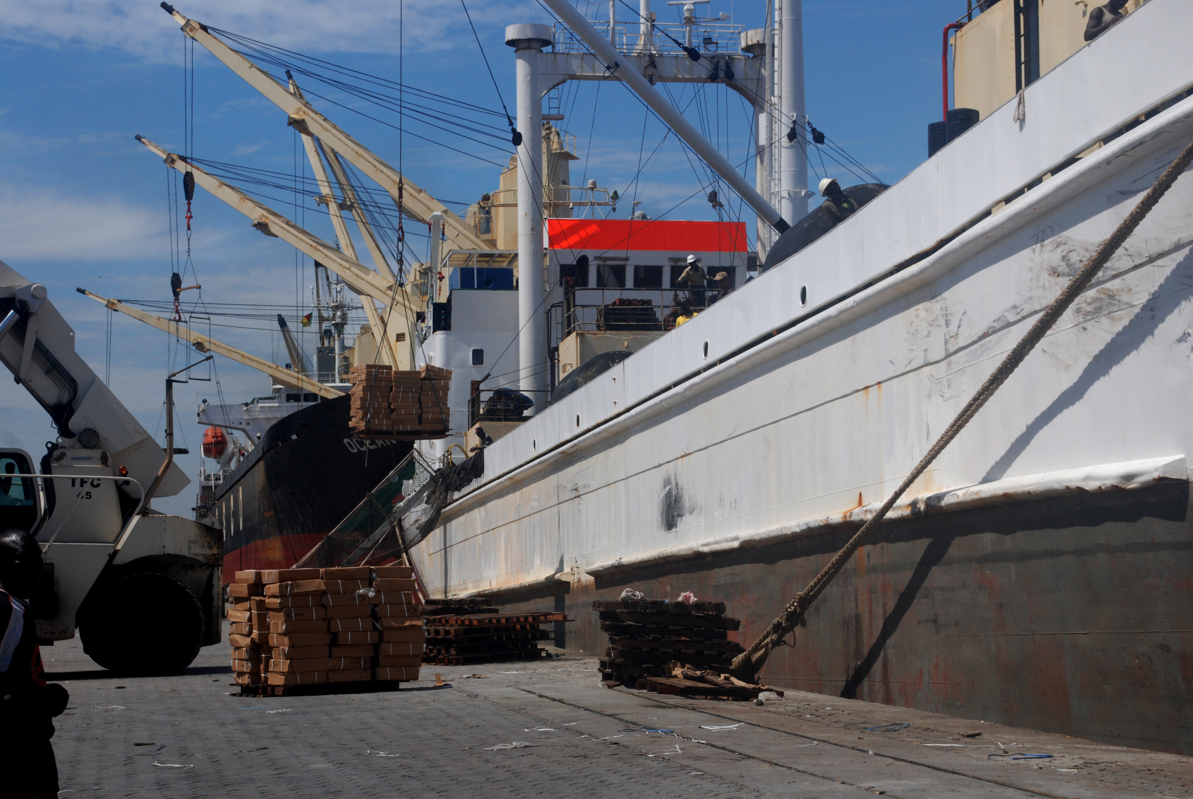 déchargement d’un navire au port de Douala au Cameroun This is an image with the theme "Africa on the Move or Transport" from: Cameroon